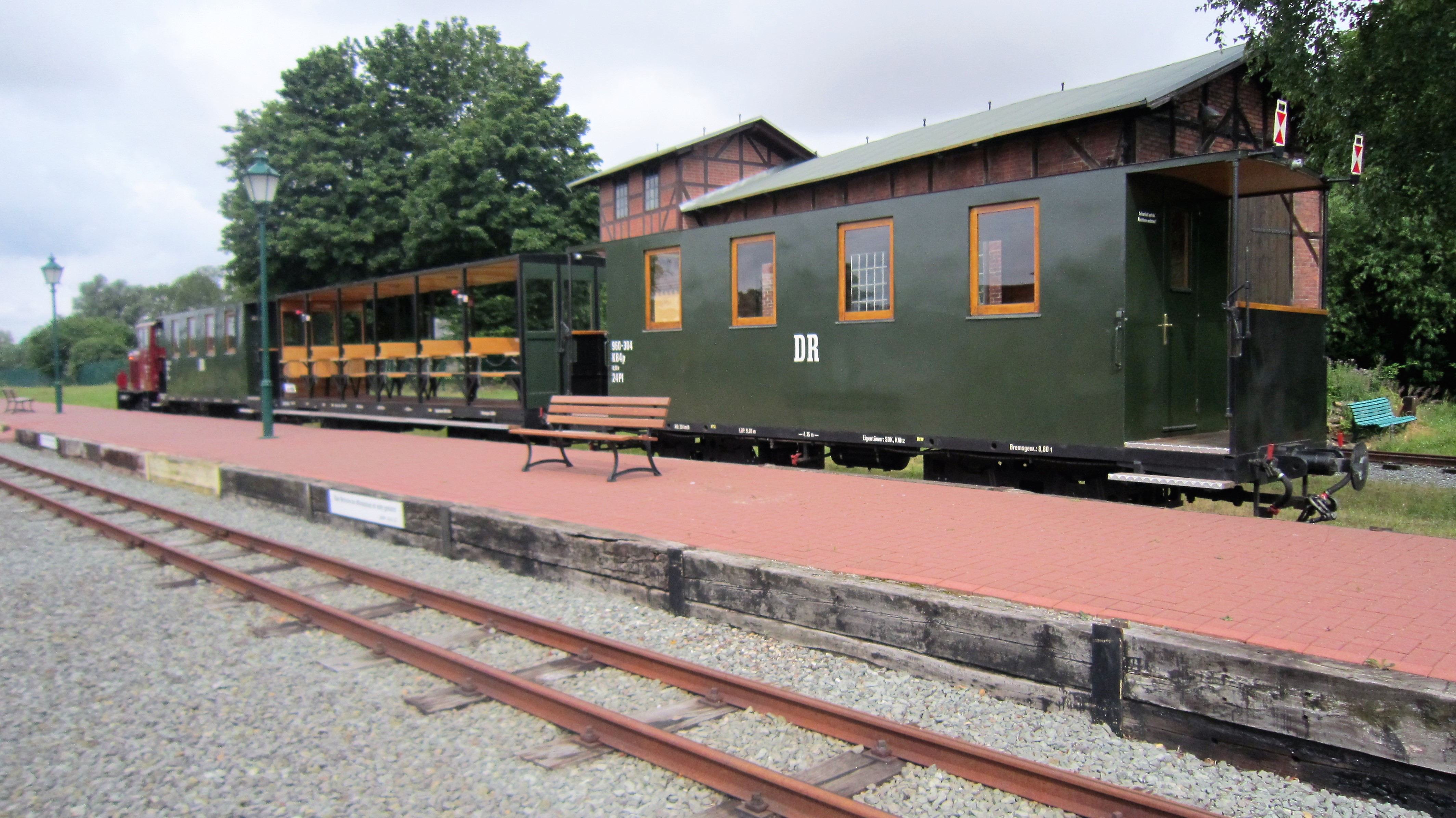 Touristische Schmalspurbahn "De Lütt Kaffeebrenner" auf dem befahrenen Teil der Bahnstrecke Grevesmühlen - Klütz im Bahnhof Klütz